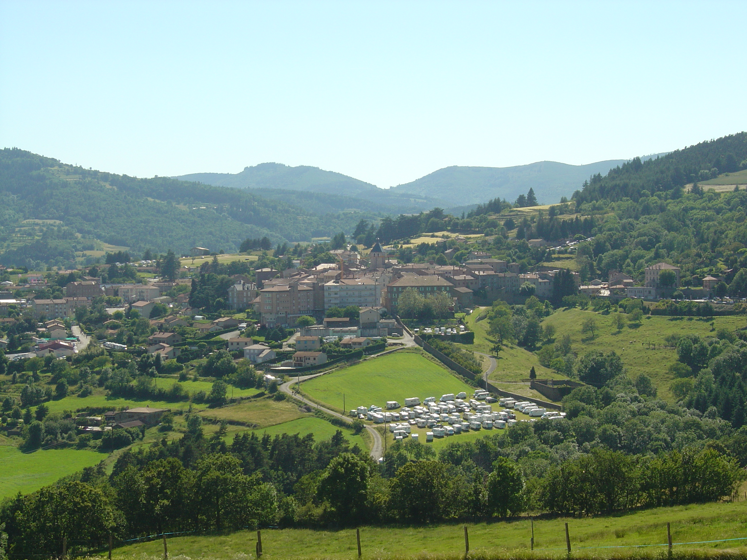 Vue générale de Saint-Félicien depuis la route du col de Fontaille